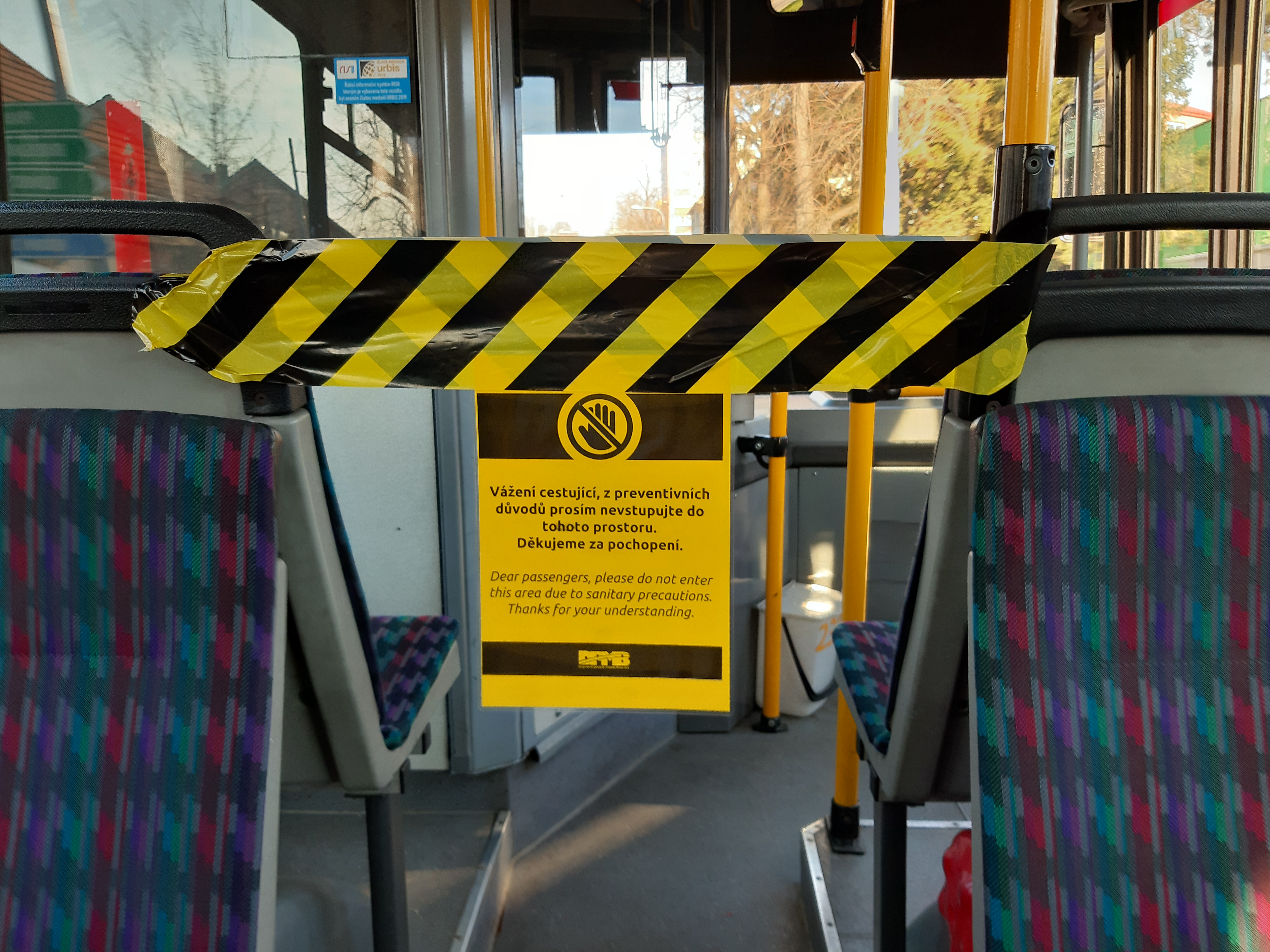 K-vir: Nelezte k řidiči!